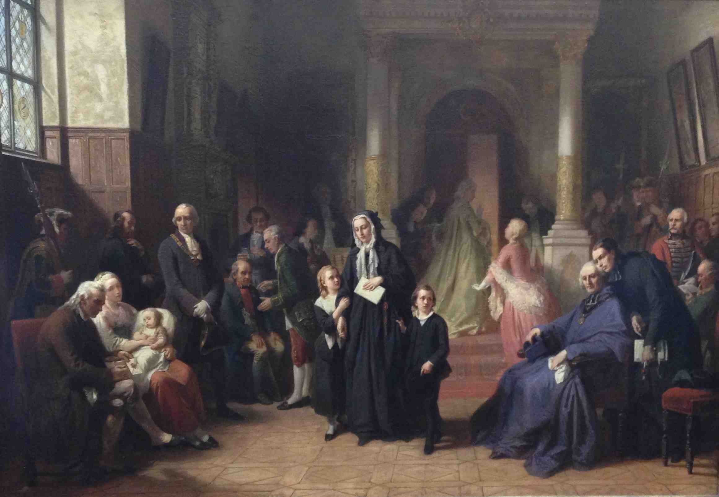 Das Vorzimmer eines Fürsten ist Gisbert Flüggens letztes Bild, das er aufgrund seines plötzlichen Todes 1859 nicht mehr vollenden konnte. 1863 kaufte es der damals bereits abgedankte König Ludwig I. als Privatmann von der Witwe des Künstlers. Heute ist es im Besitz der Neuen Pinakothek in München.